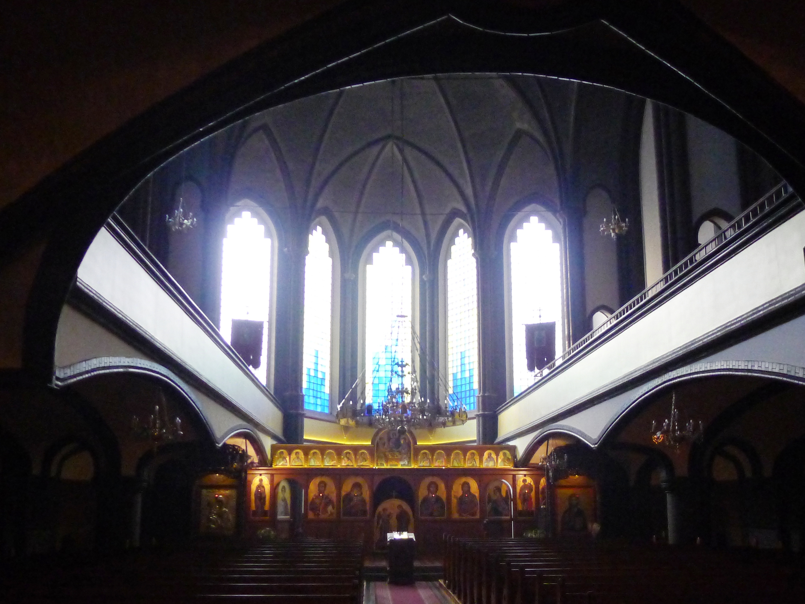 Blick Richtung Altar